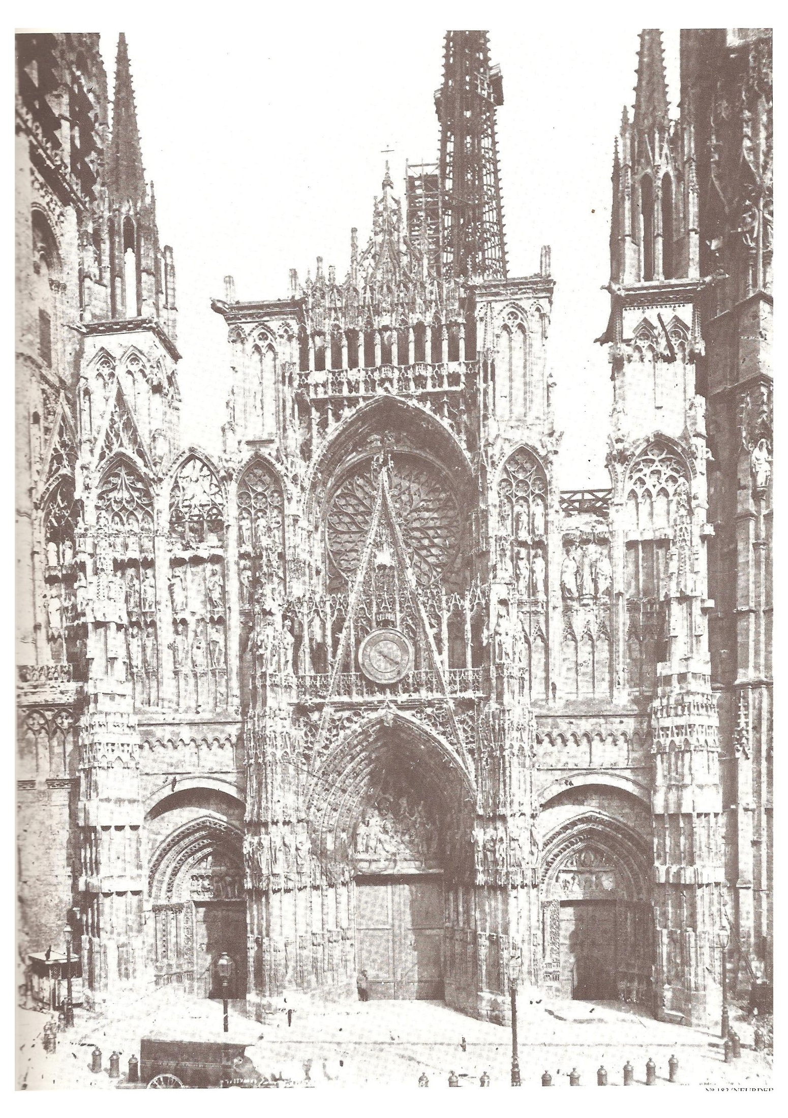 Rouen, façade de la cathédrale, 1881. Point de vue identique à certains tableaux de Claude Monet. Photographie ancienne reproduite dans Guy Pessiot, Histoire de Rouen: 1850-1900 en 500 photographies avant l'apparition de la carte postale, Editions PTC, 1981, 2004